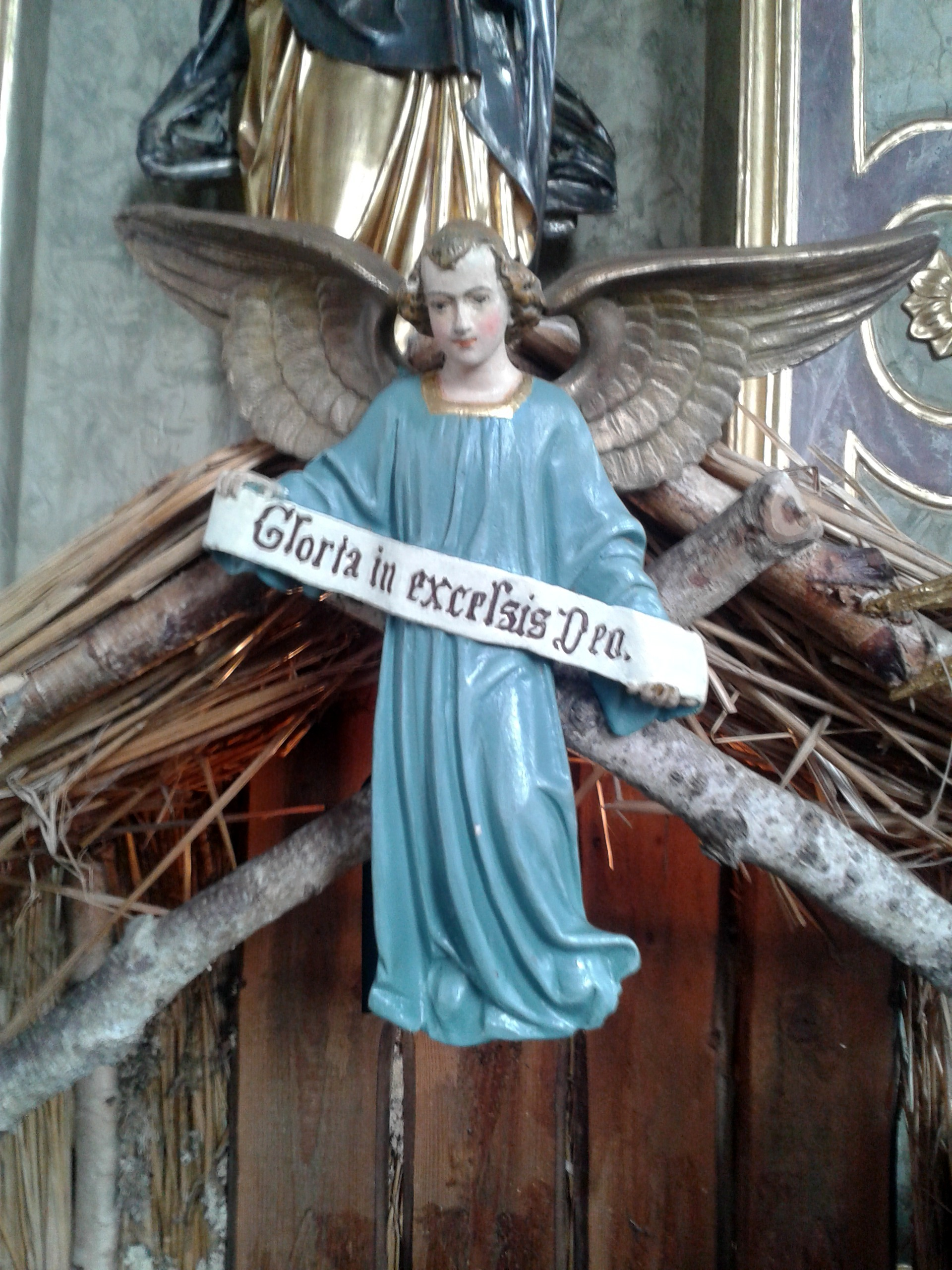 Krippe St. Johann Baptist (Mooshausen)